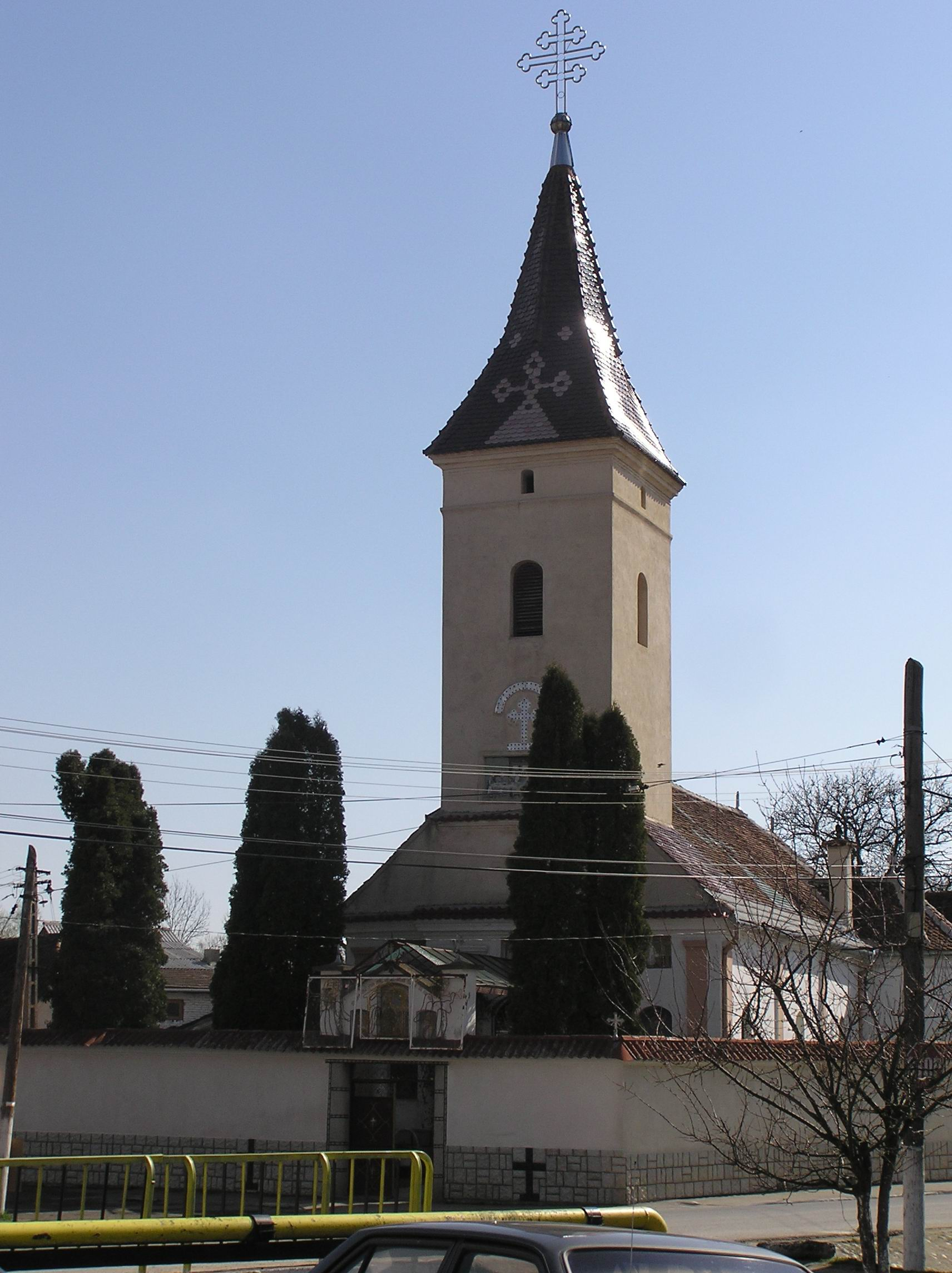 Orthodoxe Kirche der Gemeinde Vulcan (Wolkendorf), Burzenland, Siebenbürgen, Rumänien.